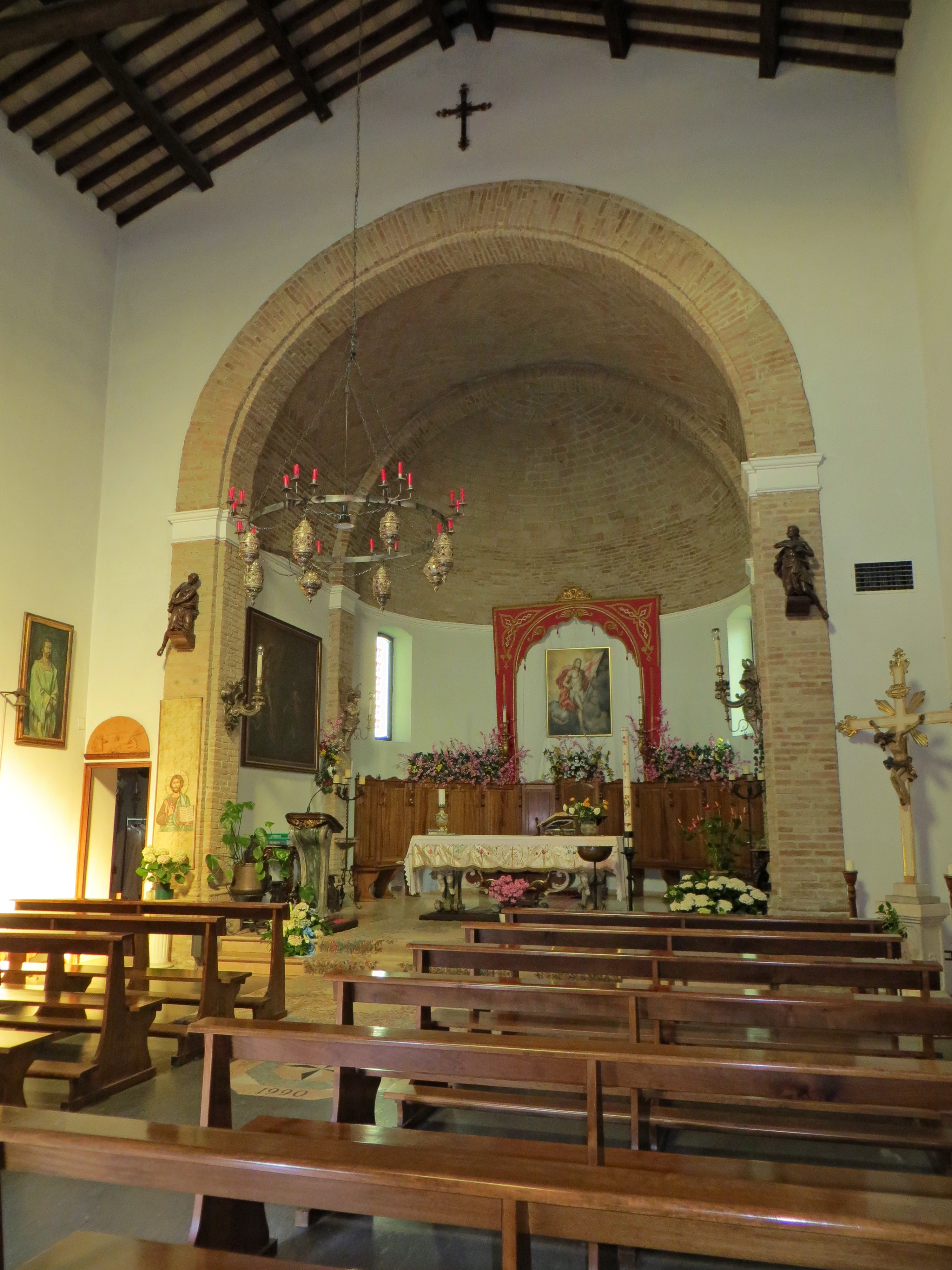 Chiesa di San Prospero (Marore) - presbiterio